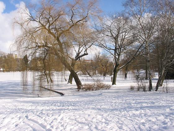 Obersee, Orankeviertel, Berlin-Hohenschönhausen